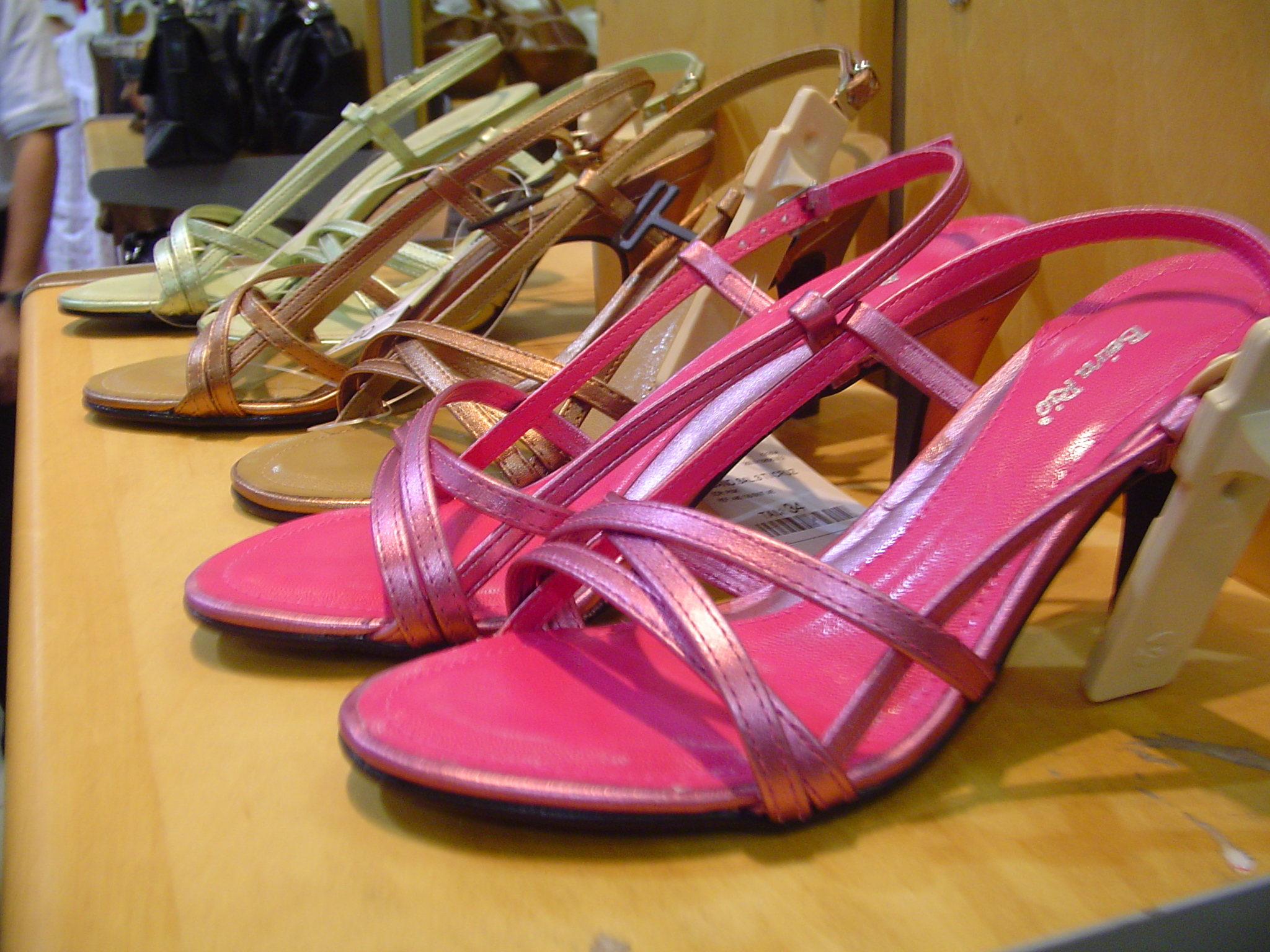 sapatos